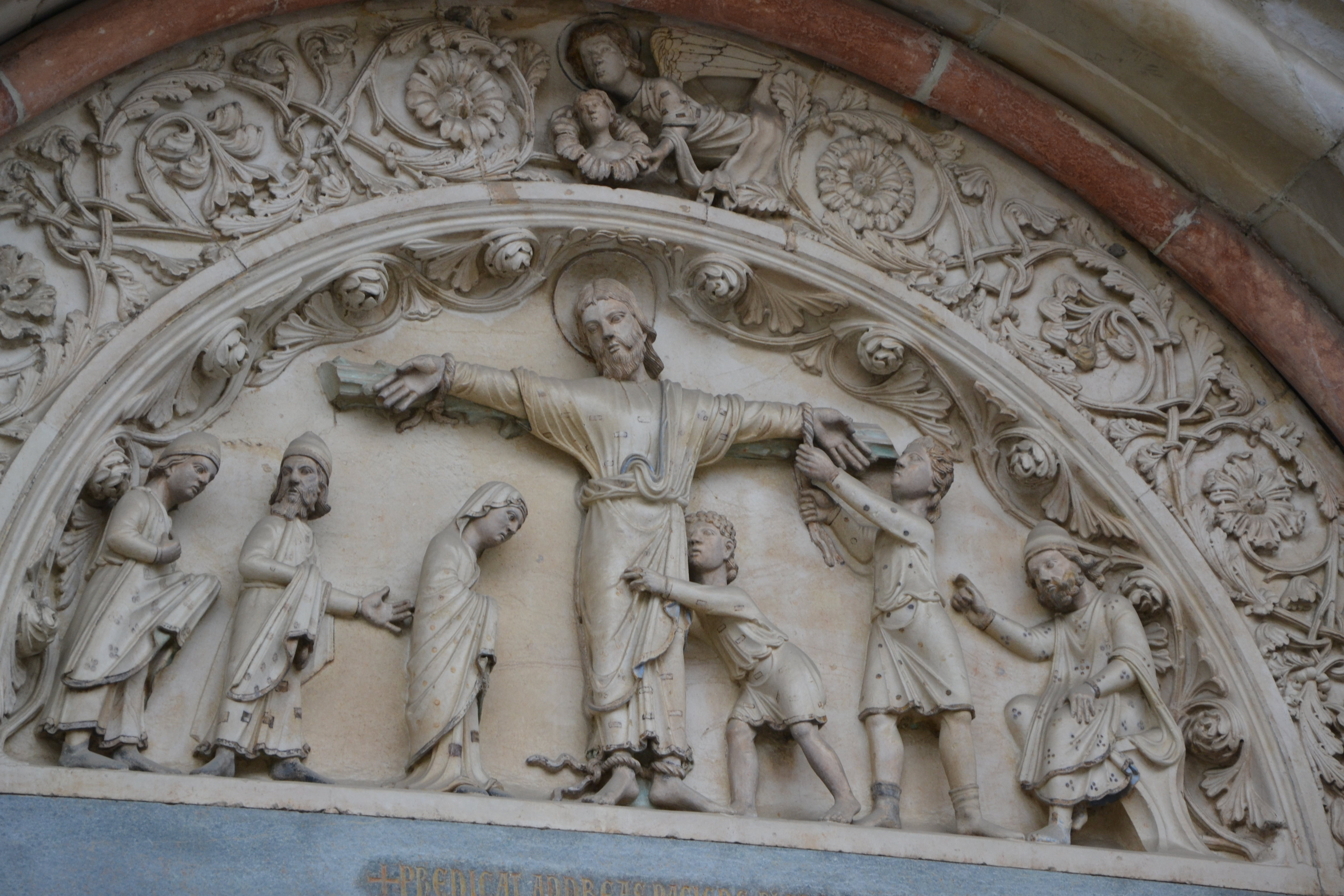 La lunetta centrale mostra (come la scritta a caratteri semigotici incisa sull'architrave puntualmente indica) la scena del Martirio di Sant'Andrea. Vi si osserva al centro la figura Sant'Andrea crocifisso a una croce di rozza fattura (in forme che imitano la Crocifissione di Gesù)[6]; a destra Egea, proconsole d'Acaia che ordina a due suoi sgherri l'esecuzione del martirio; a sinistra è raffigurata la vergine cristiana che diede sepoltura al corpo del santo assieme due fedeli; nell'archivolto, impreziosito da decorazioni floreali, è rappresentato un angelo che porta in cielo l'anima del Santo. This is a photo of a monument which is part of cultural heritage of Italy.